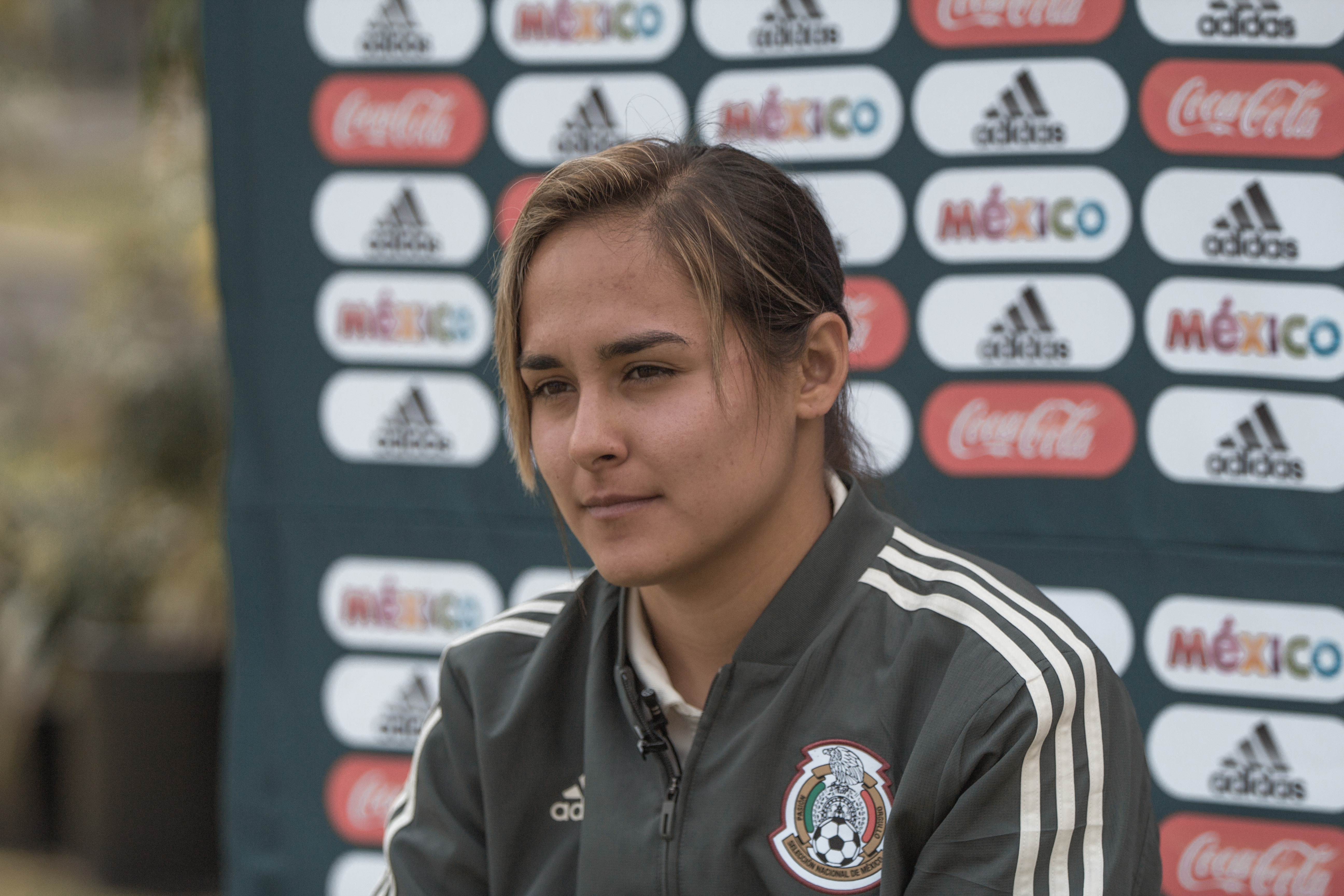 Selección Femenil de Futbol de México.